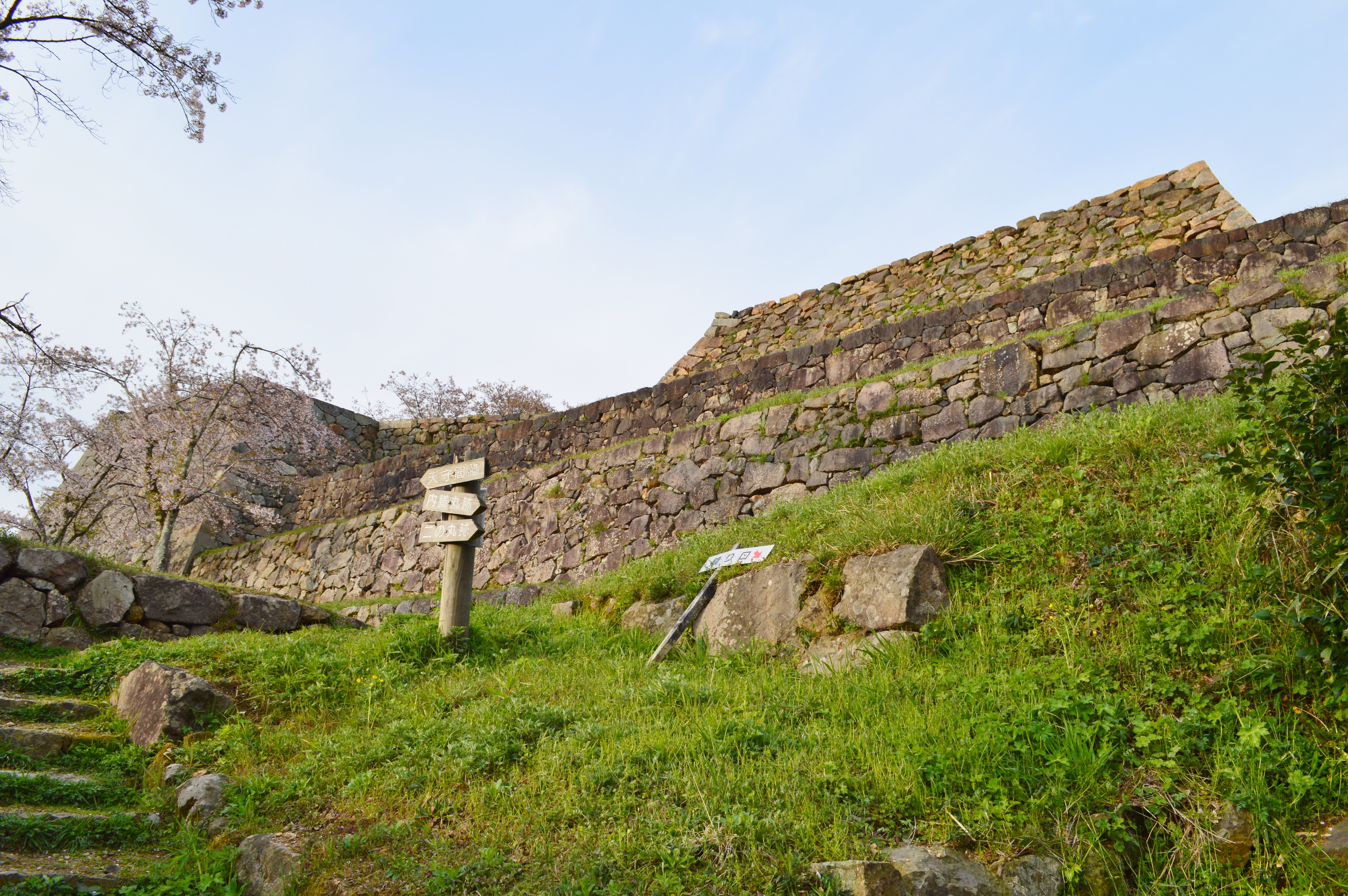 米子城 本丸石垣 Nikon D3200